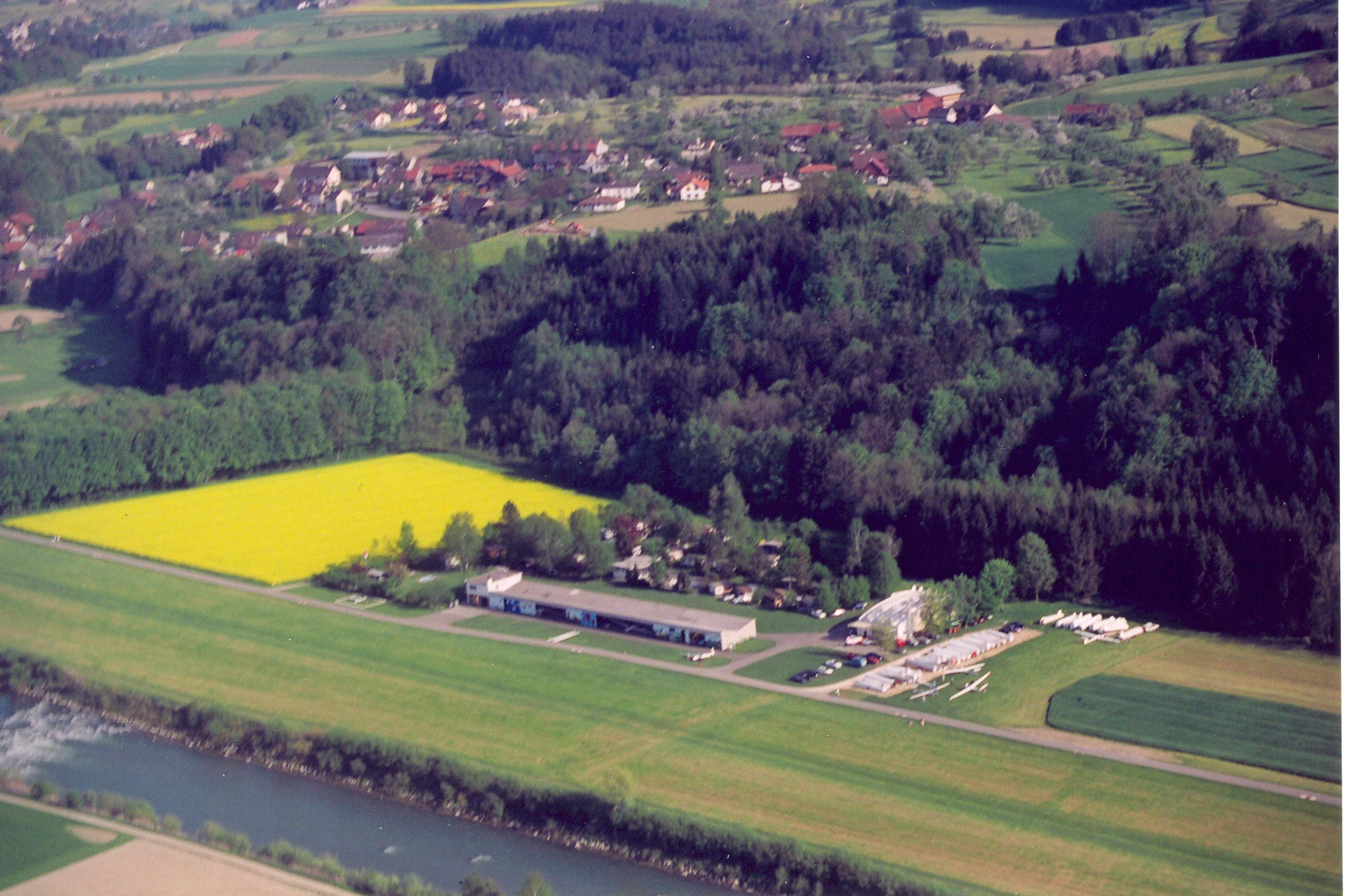 Aerial Picture